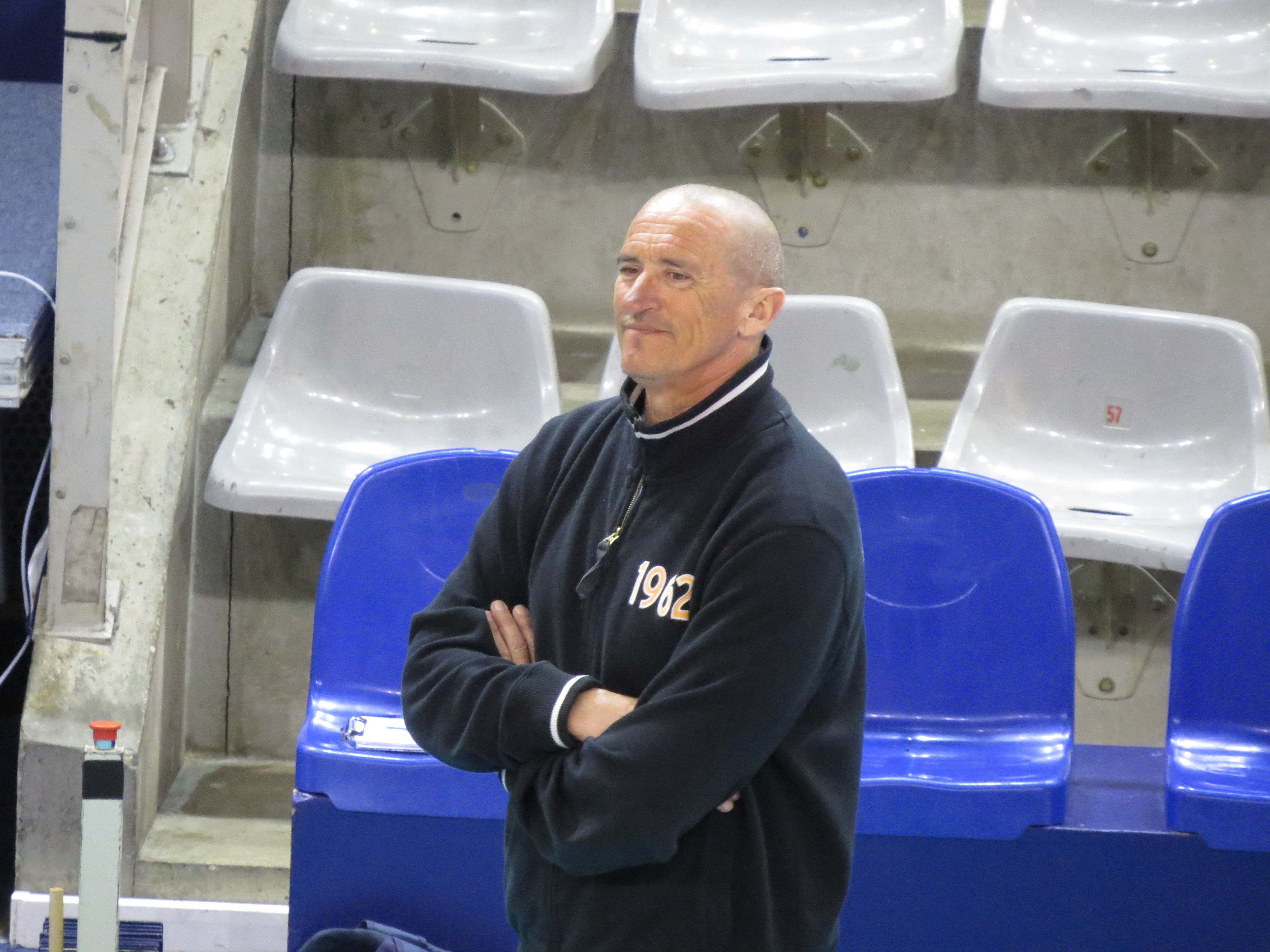 Photo réalisée lors du match de championnat de France de volley entre le Paris Volley et NiceVB Coach : Mladen Kasić